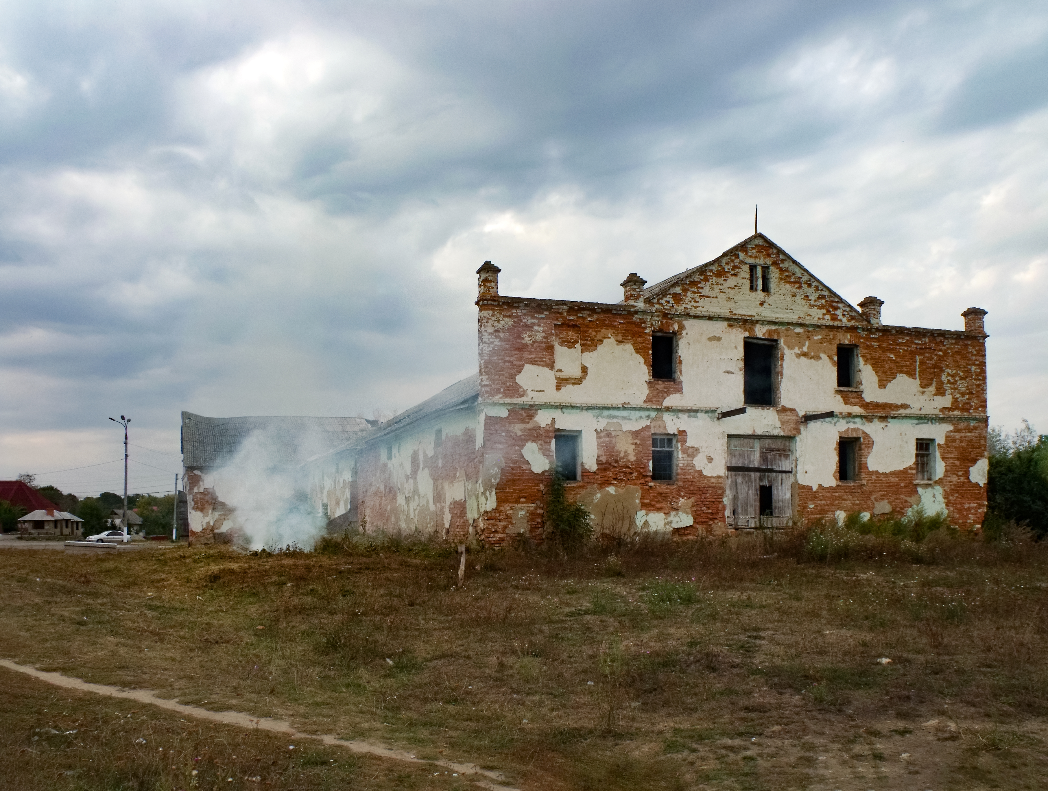 Заїзд: Вінницька область, Тиврівський район, с. Ворошилівка, вул. Леніна